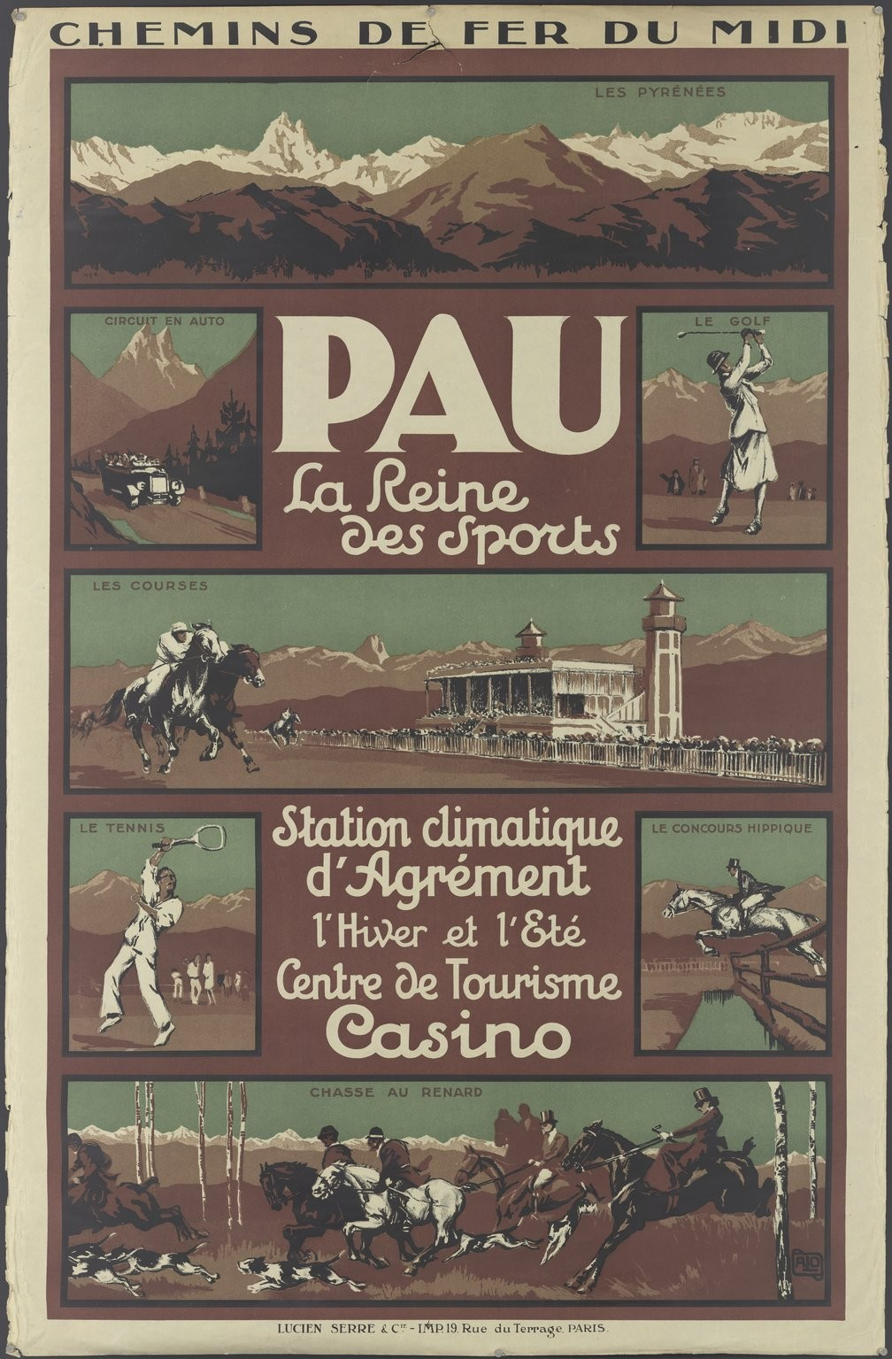 Chemins de fer du Midi. Pau : la reine des sports / Hallo, Charles